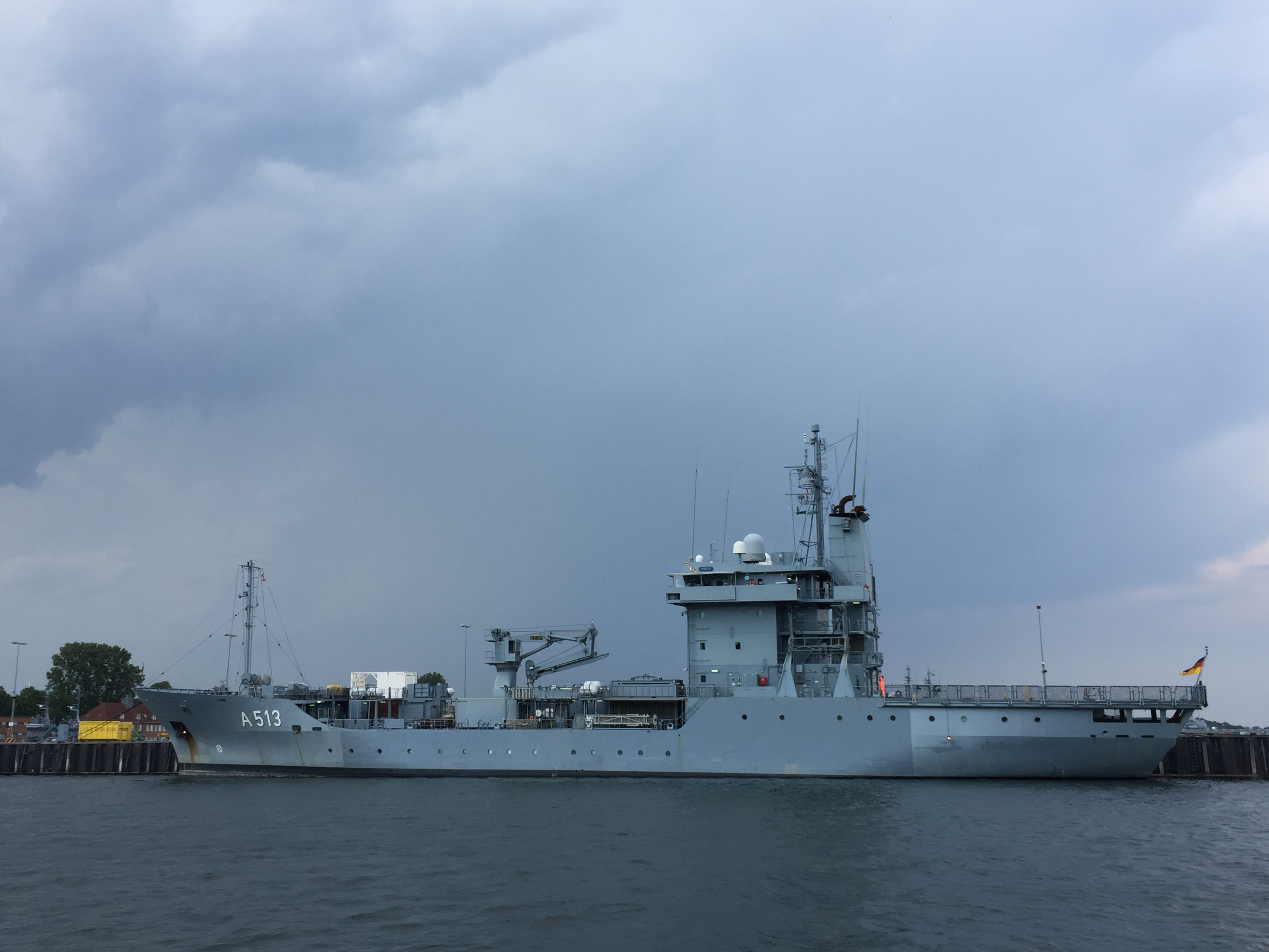 Tender A513 "Rhein" Seitenansicht